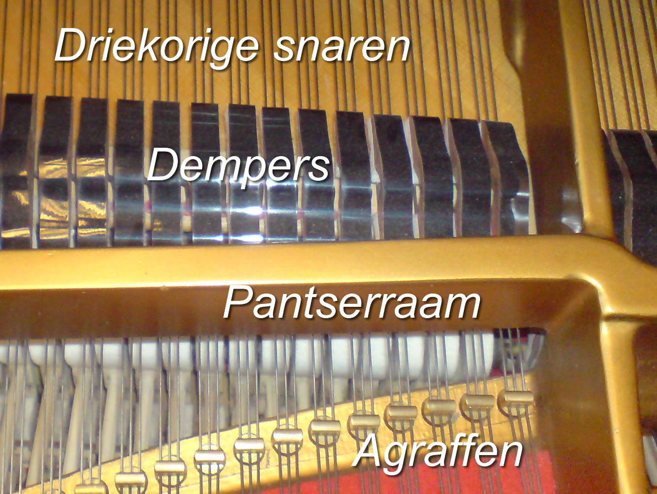 Educatieve foto van vleugelonderdelen